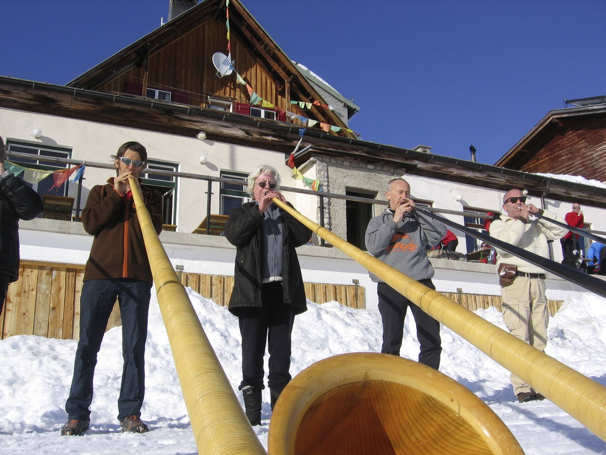 Alphornspieler im Winter vor der Gjaid Alm